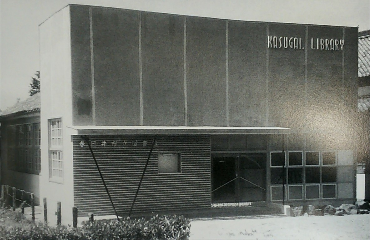 1957年に開館した春日井市立図書館。